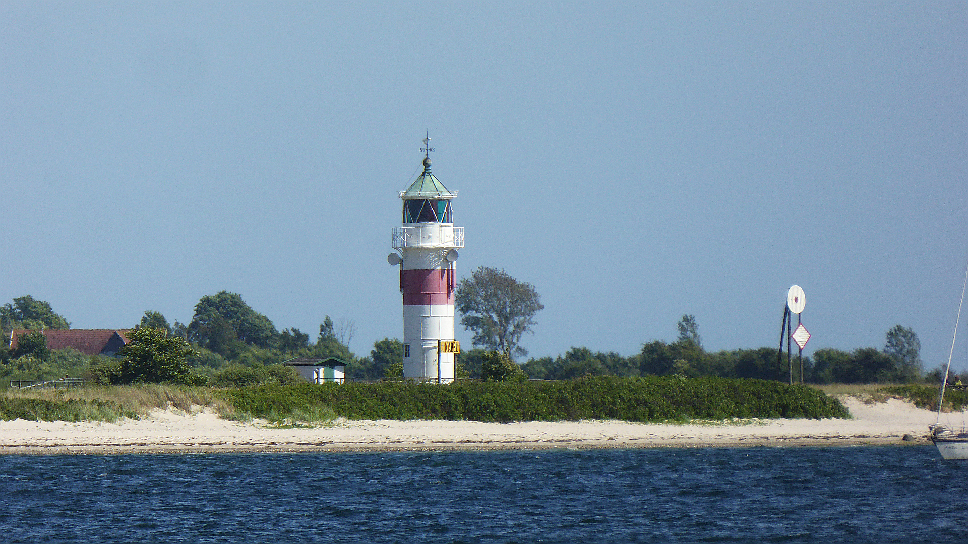 Øen Årø, Årø fyr 13 m høj - Insel Aarö Leuchtturm von 1905 Höhe 13 m Jütland Dänemark Foto Wolfgang Pehlemann P1210090